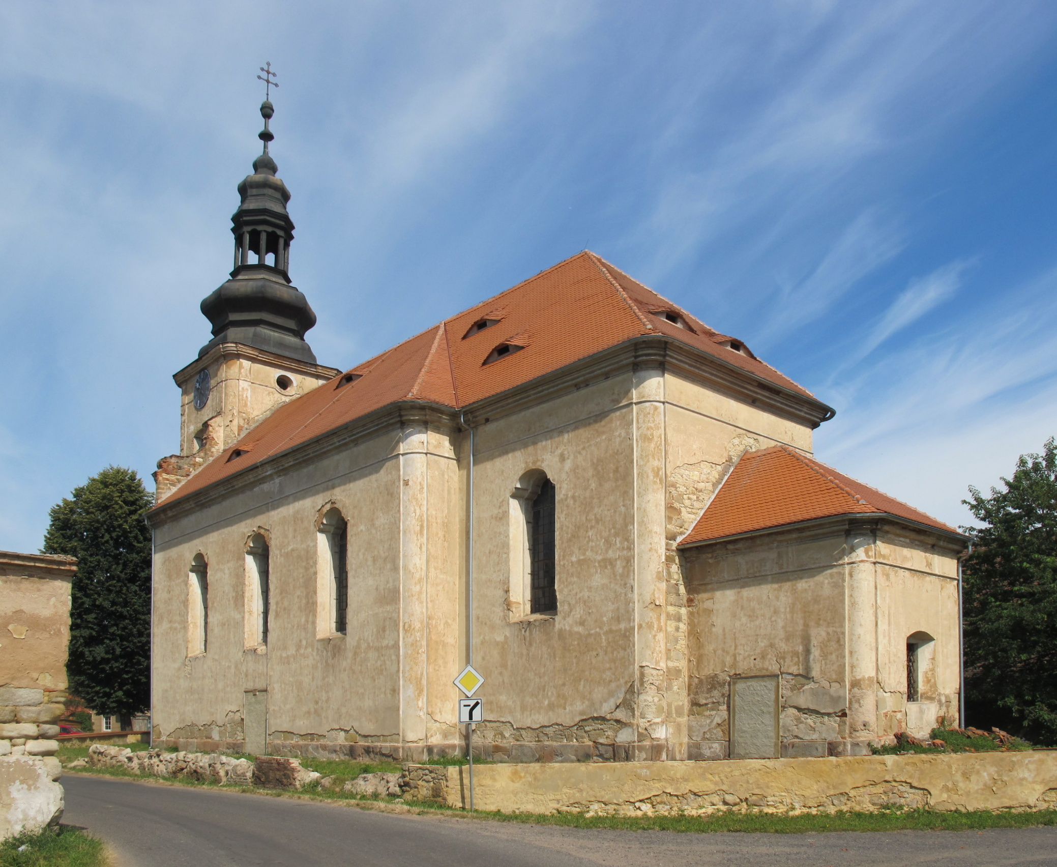 Kostel sv. Václava (Velká Černoc), Velká Černoc